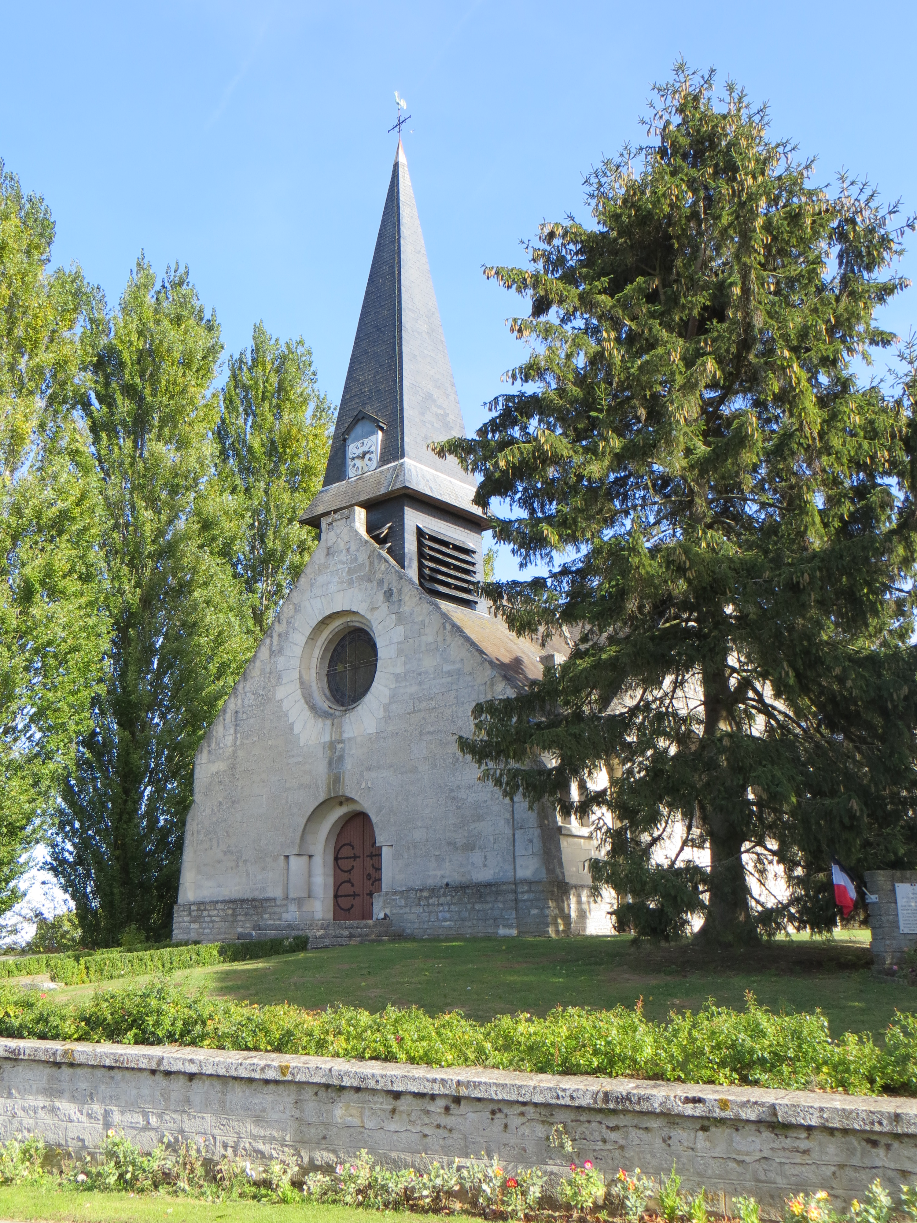 Vue générale de l'église